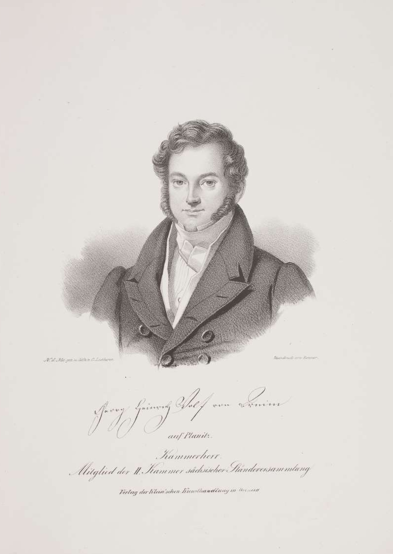 Kgl. sächs. Kammerherr, Abgeordneter der Zweiten Kammer der sächs. Ständeversammlung 1833/34 bis 1854, 1800-1855